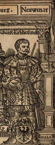 Wilhelm II. von Neuenahr († 1552) als Erbhofmeister des Erzbischof Hermann von Wied, 1538